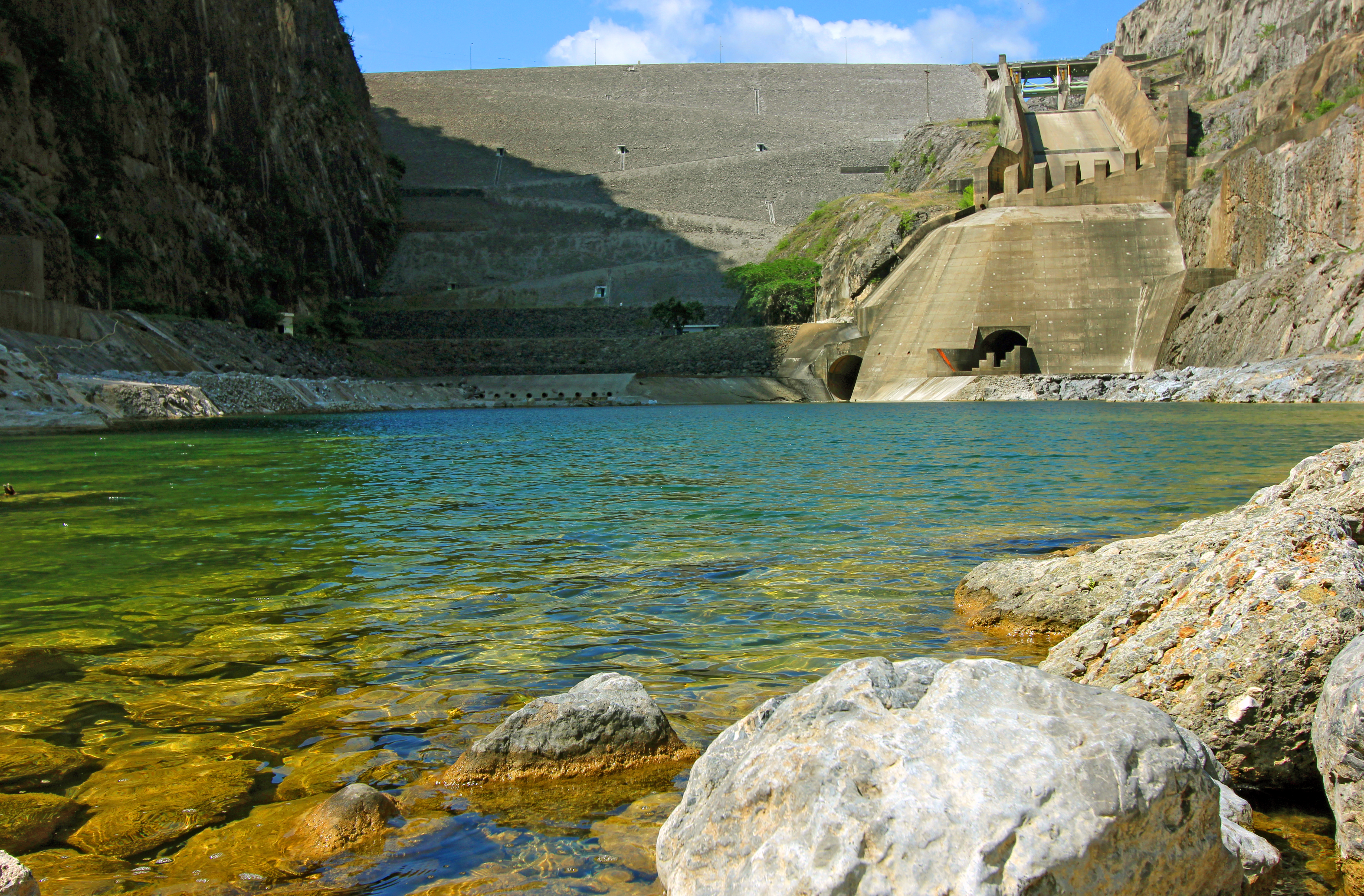 Vista Frontal de la represa.